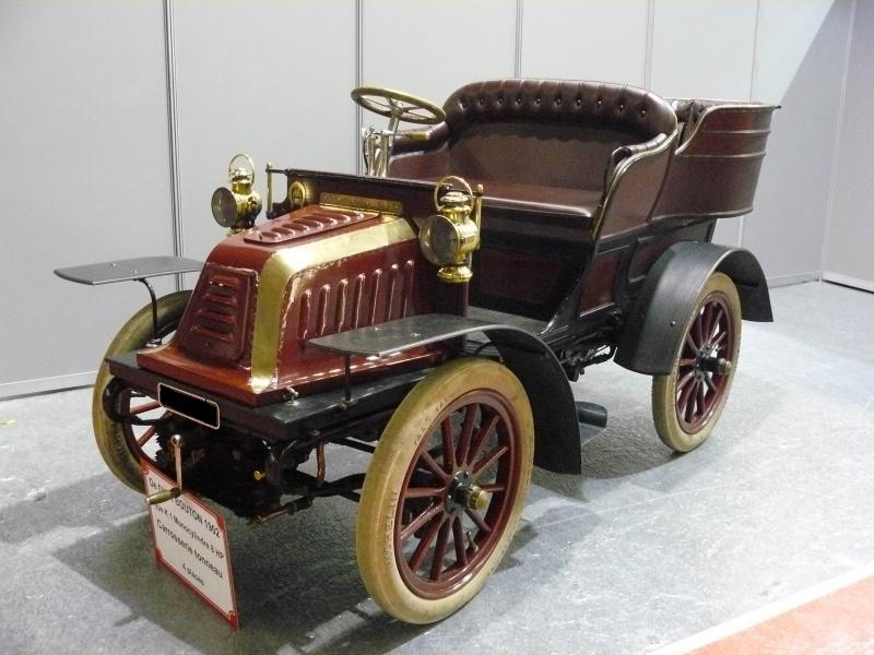 De Dion-Bouton "Populaire" Tonneau 8 CV Type K1 (1902) @ Retromobile 2012